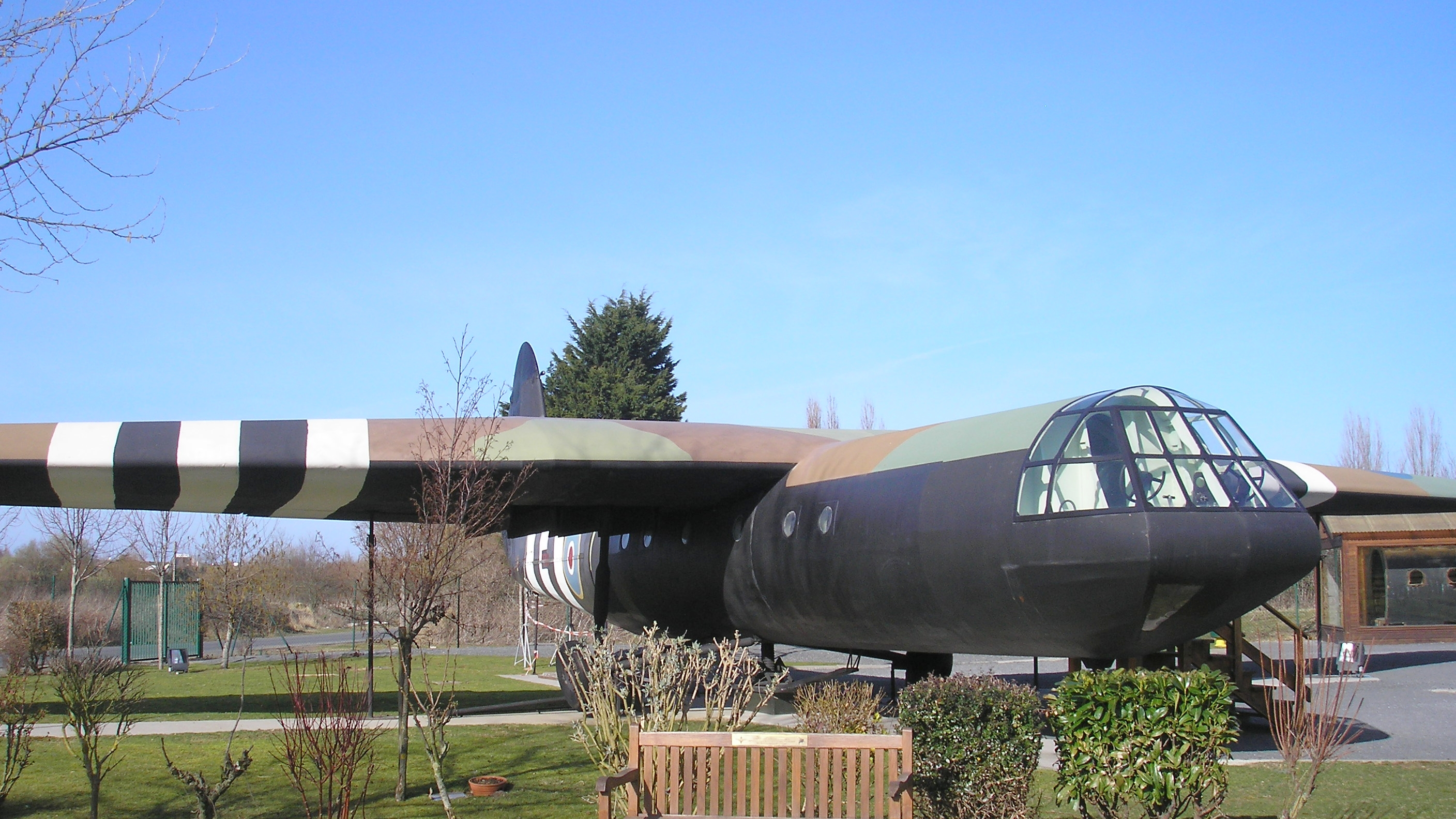 Réplique grandeur nature d'un planeur Horsa (Mémorial Pegasus Bridge, Normandie, France).